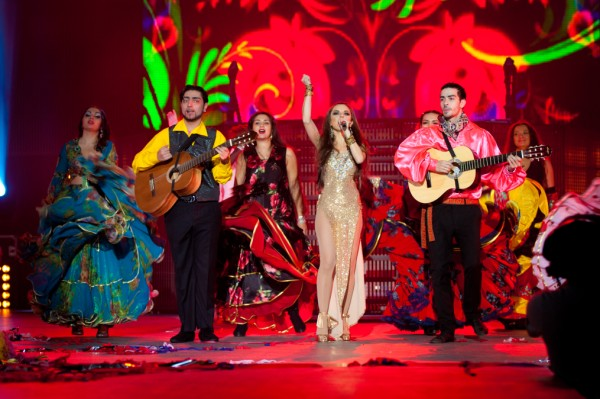 Анна Плетнёва на Концерте в Крокус Сити Холле исполняет песню Роман